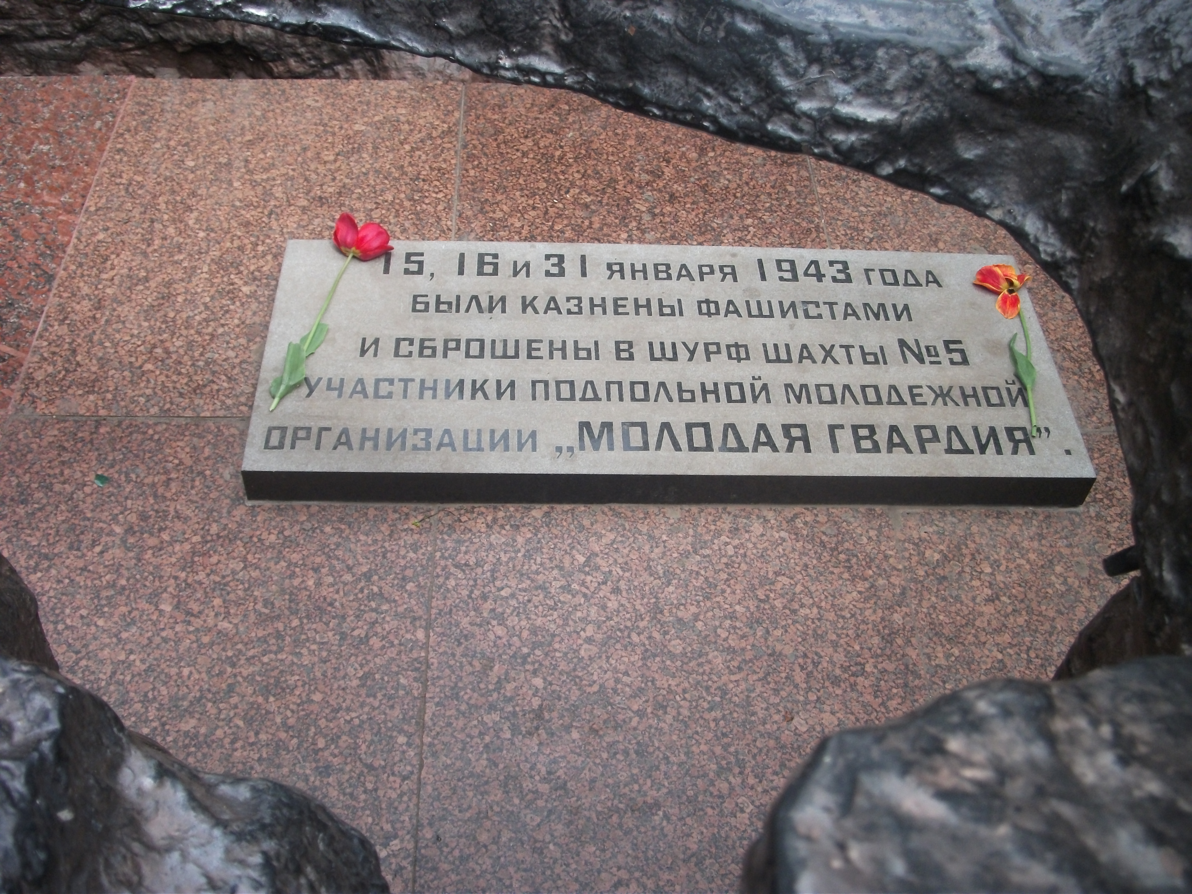 Мемориальная плита посвящена казнённым членам подпольной антифашистской организации "Молодая гвардия"